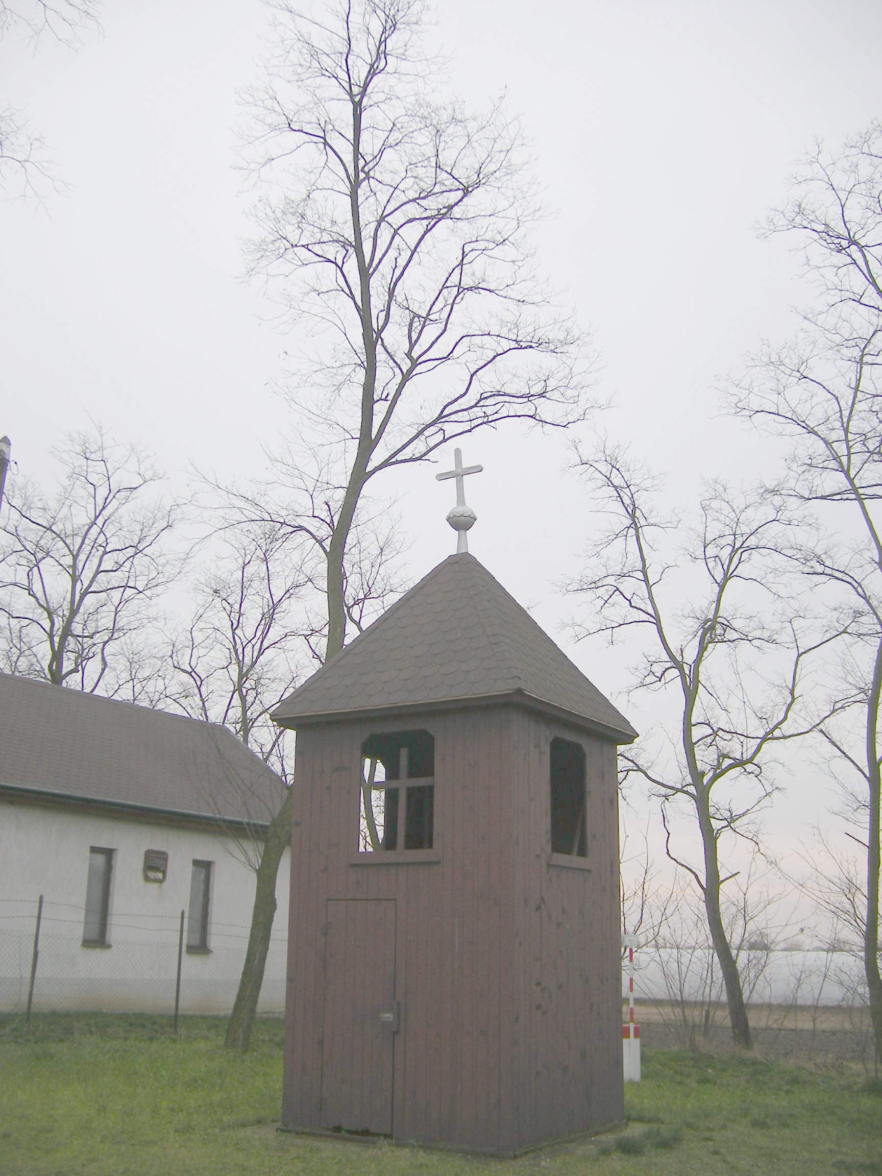 Ógyalla - Vék - harangláb